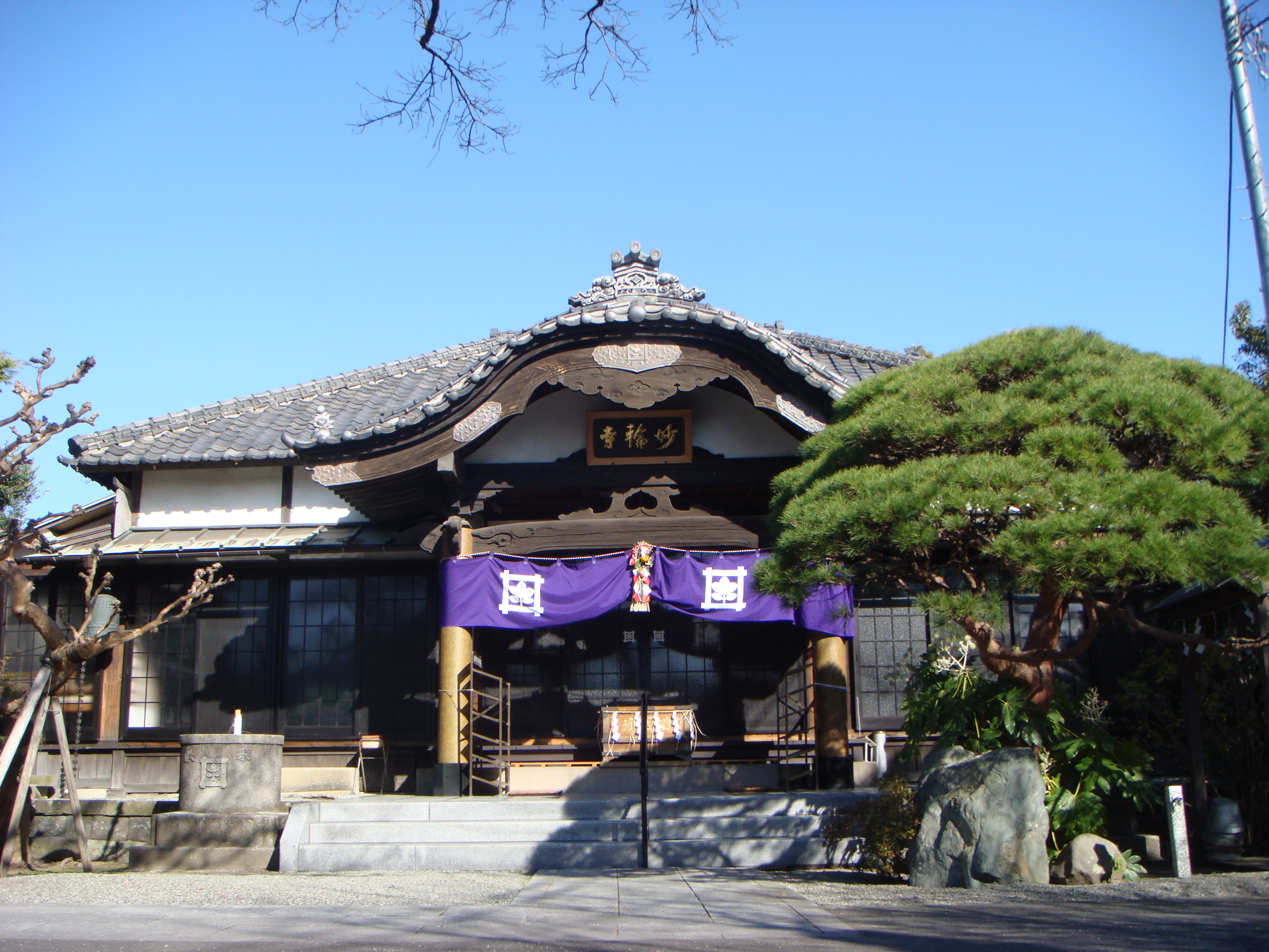 福聚山 妙輪寺